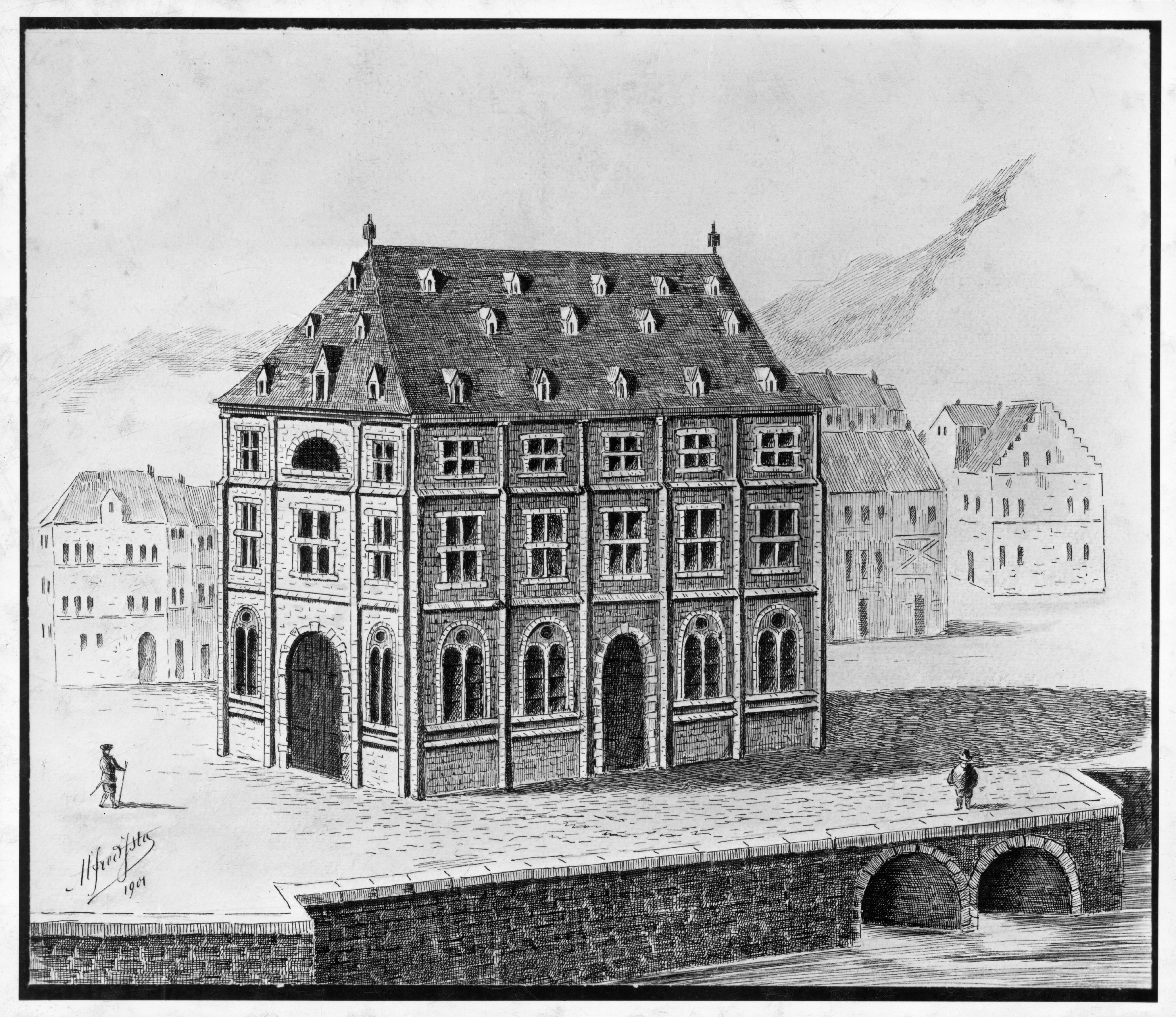 Théâtre de la Batte. Gravur vum Julius Milheuser (1649), fir den Atlas de Baeu. Kategorie:Léck